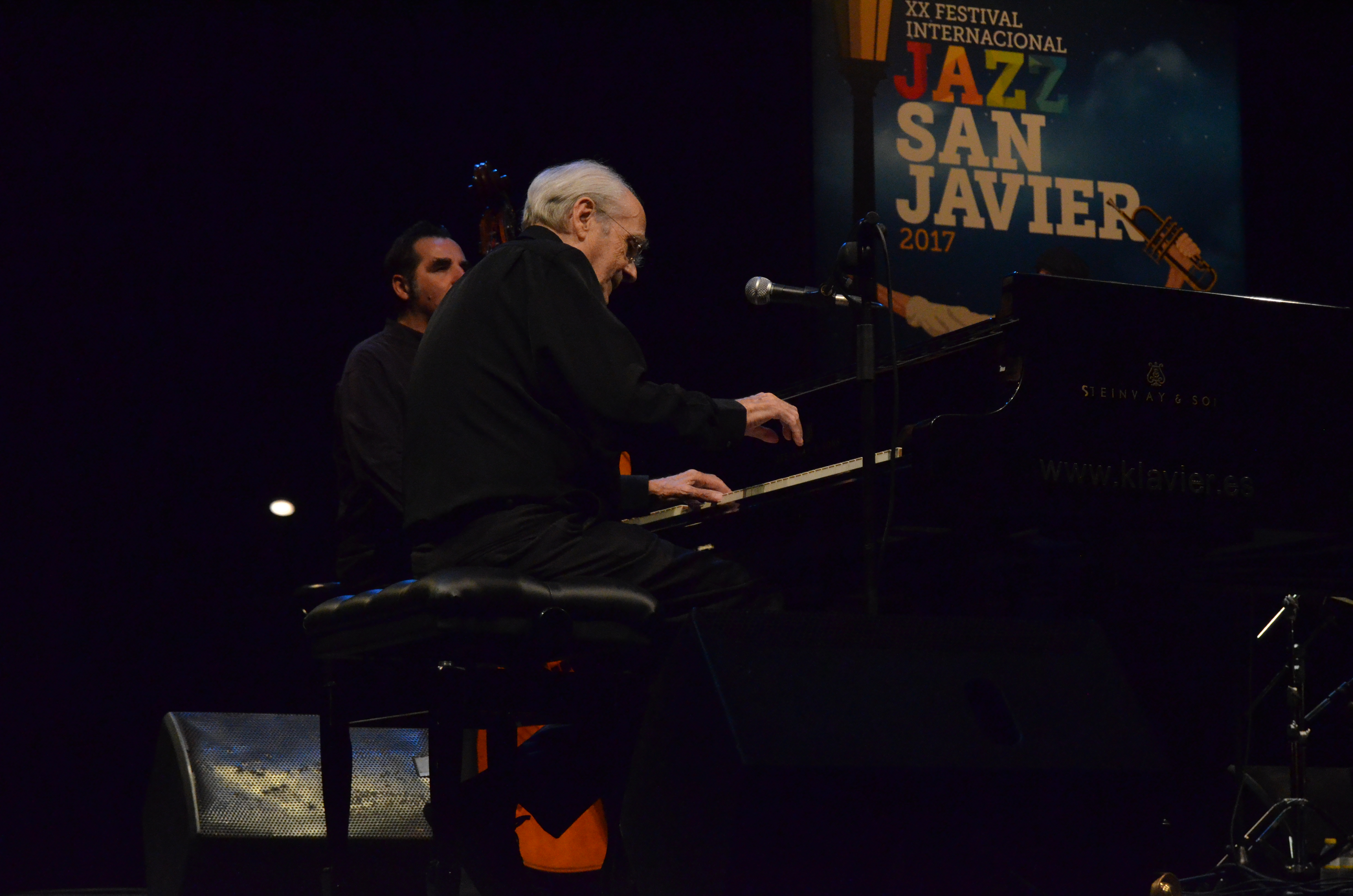 Michel Legrand, concierto de clausura de la XX edición del Festival Internacional de Jazz de San Javier (30 de julio de 2017)